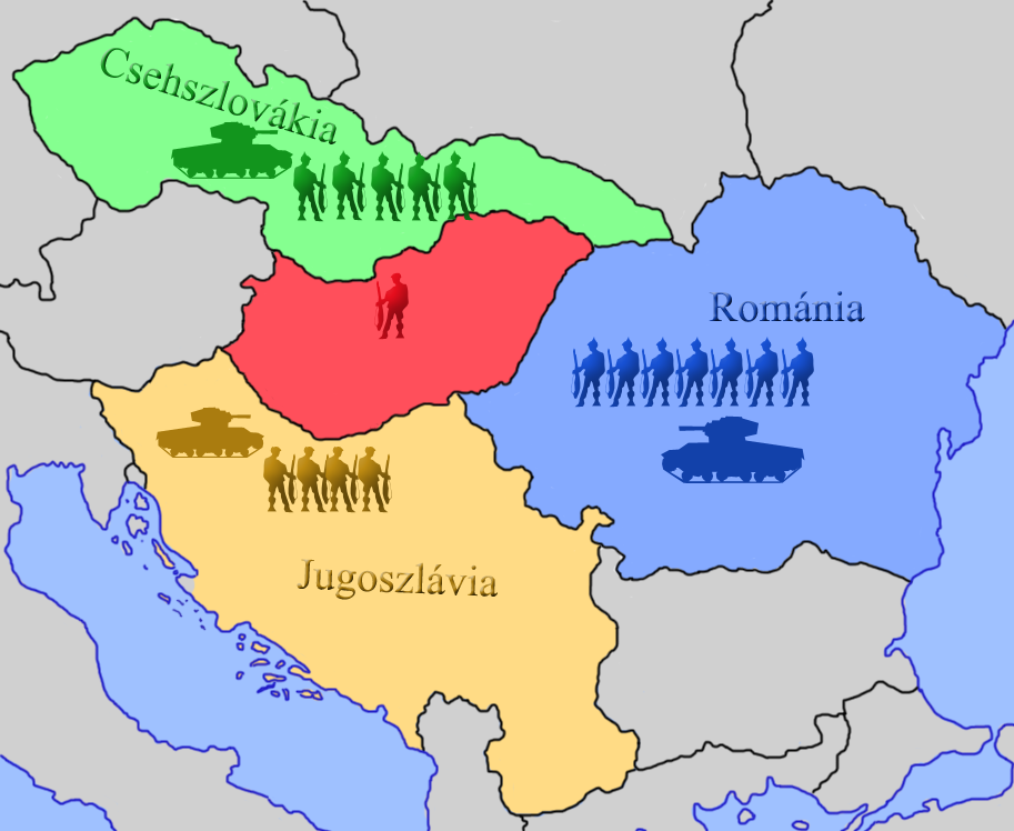 Русиньскый: Пропорции военной силы Малой Антанты и Мадярщины, 1920